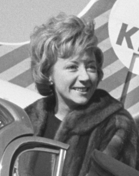 Colette Brosset en promotion pour le film "La belle américaine" aux Pays-Bas. Libre de droits